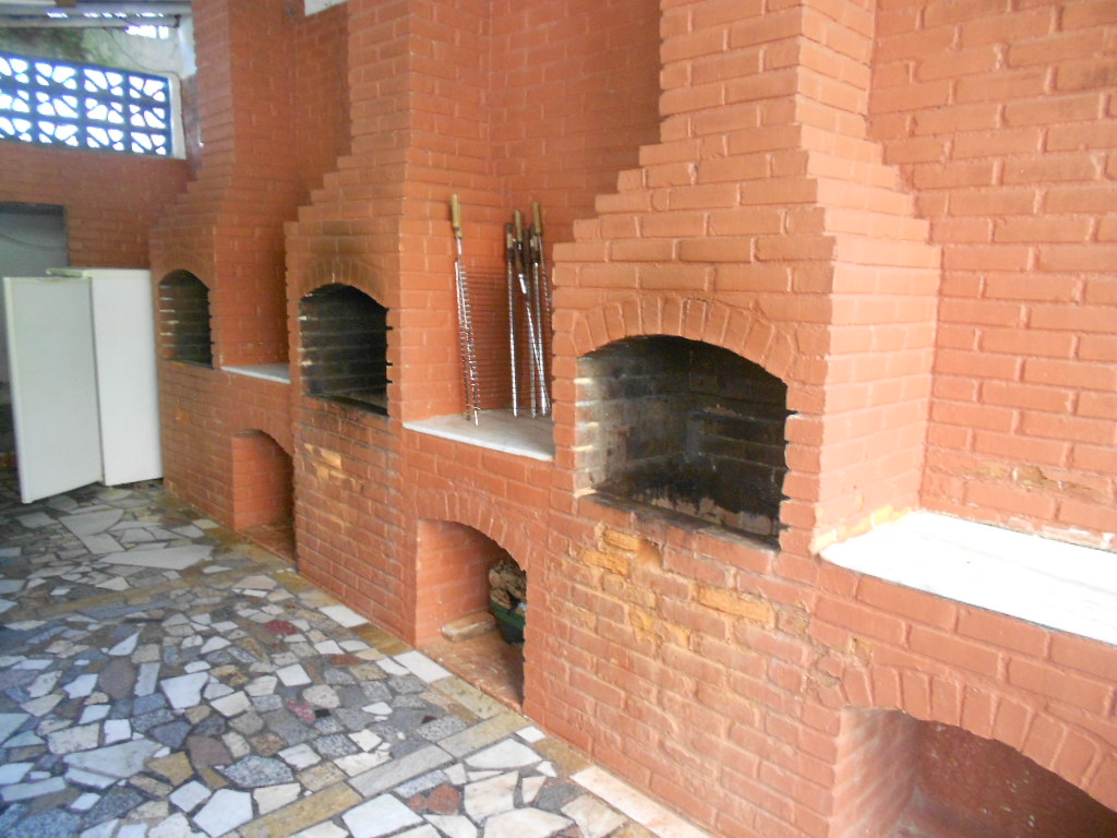 Churrasqueira no Edifício Solar das Laranjeiras, Rio de Janeiro, Brasil.